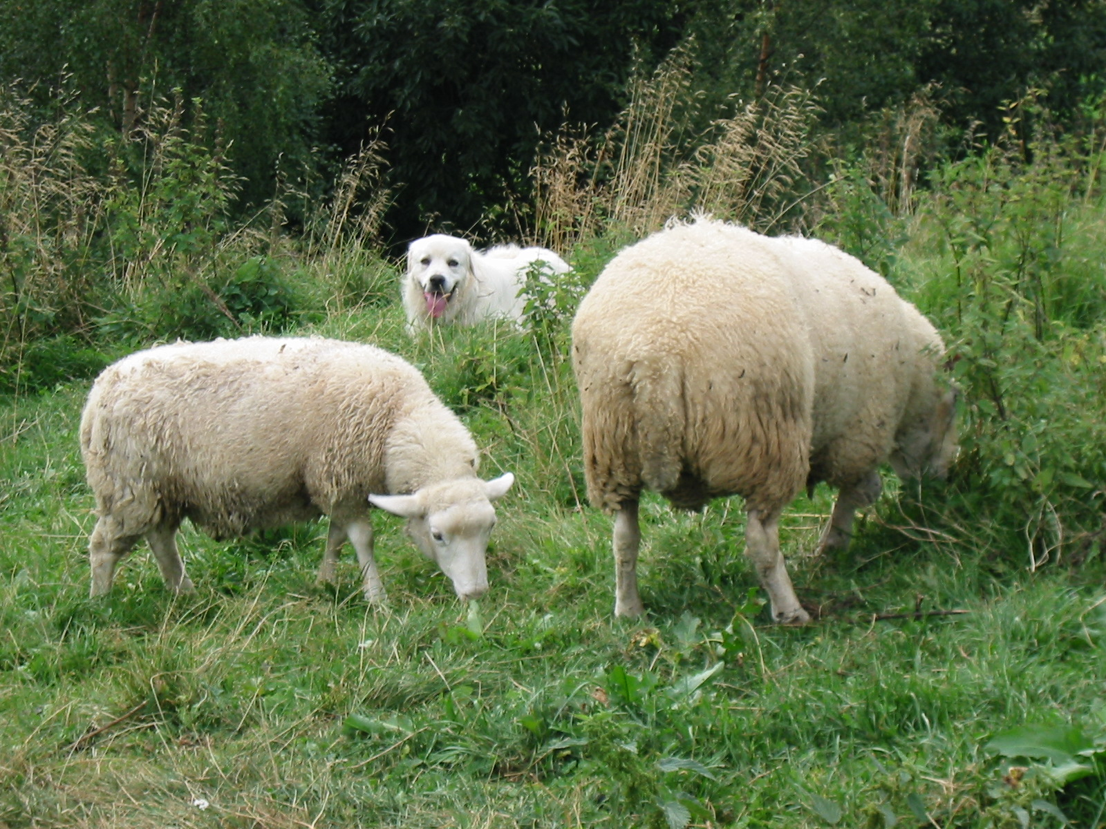 Vokterhund på jobb